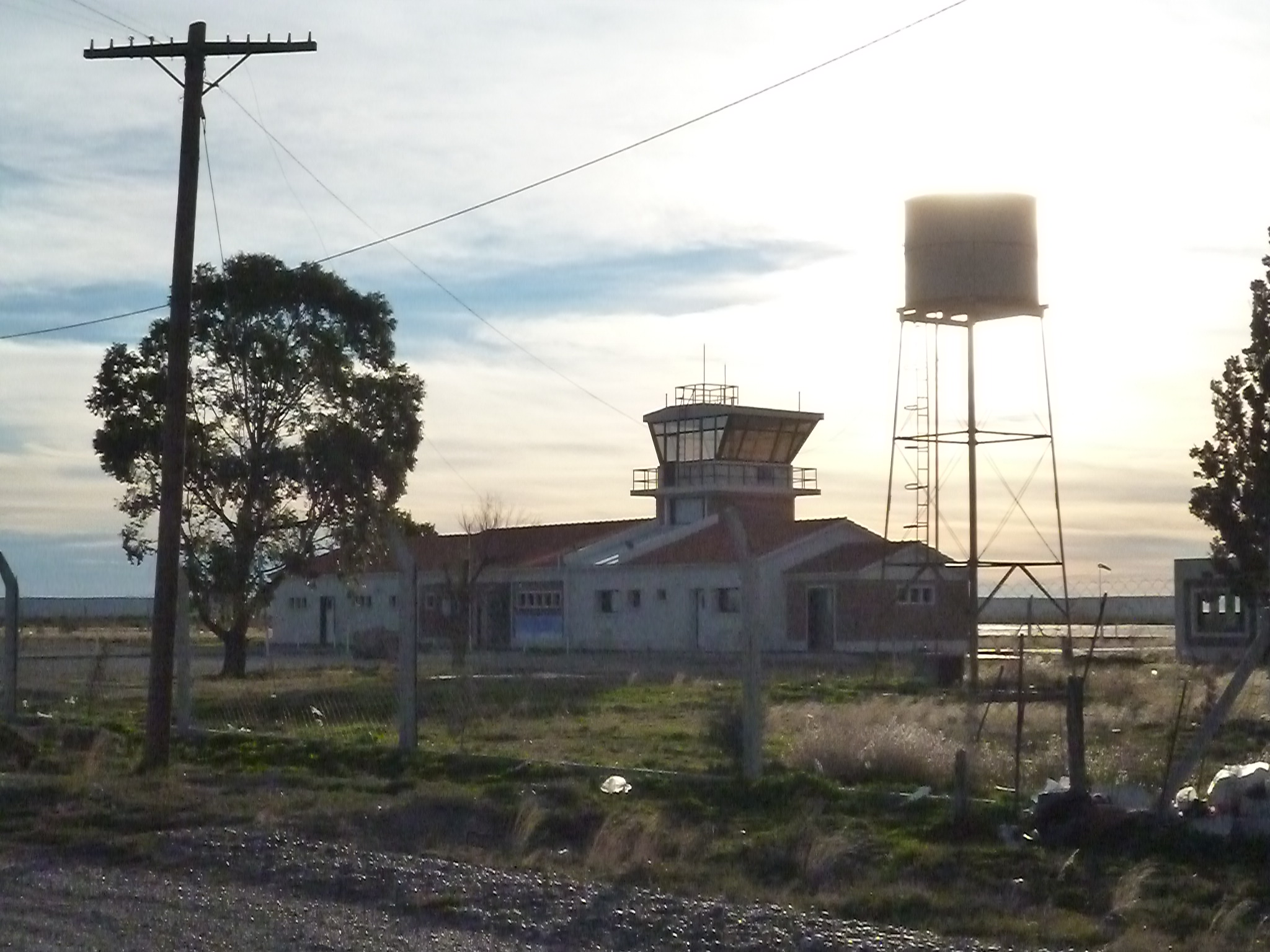 Aeropuerto Viejo de Trelew, actual Centro Cultural por la Memoria. Funcionó como terminal aérea entre 1938 y 1979, cuando fue reubicado. El 15 de agosto de 1972, 110 prisioneros políticos se fugaron del penal de Rawson y tomaron un BAC 1-11 de Austral que se dirigía a Buenos Aires, para dirigirse primero a Chile y después a Cuba. Los planes fallaron y 19 de ellos, que no lograron escaparse, decidieron tomar el edificio. Una patrulla militar bajo las órdenes del capitán de corbeta Luis Emilio Sosa, condujo a los prisioneros recapturados a la Base Aeronaval Almirante Zar. Allí fueron fusilados el 22 de agosto, en lo que se conoce como "Masacre de Trelew".